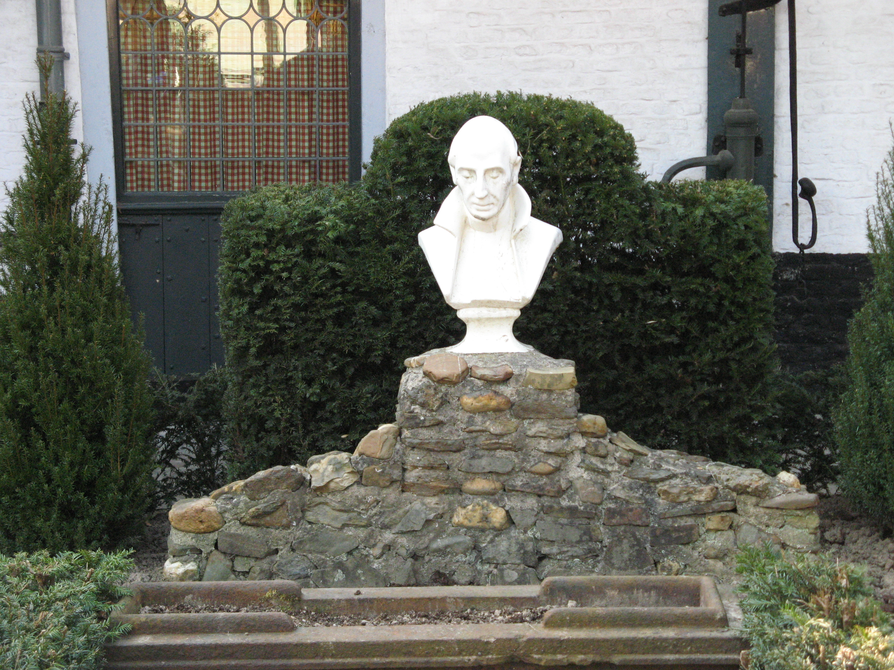 Foto van buste Pater Karel in Munstergeleen